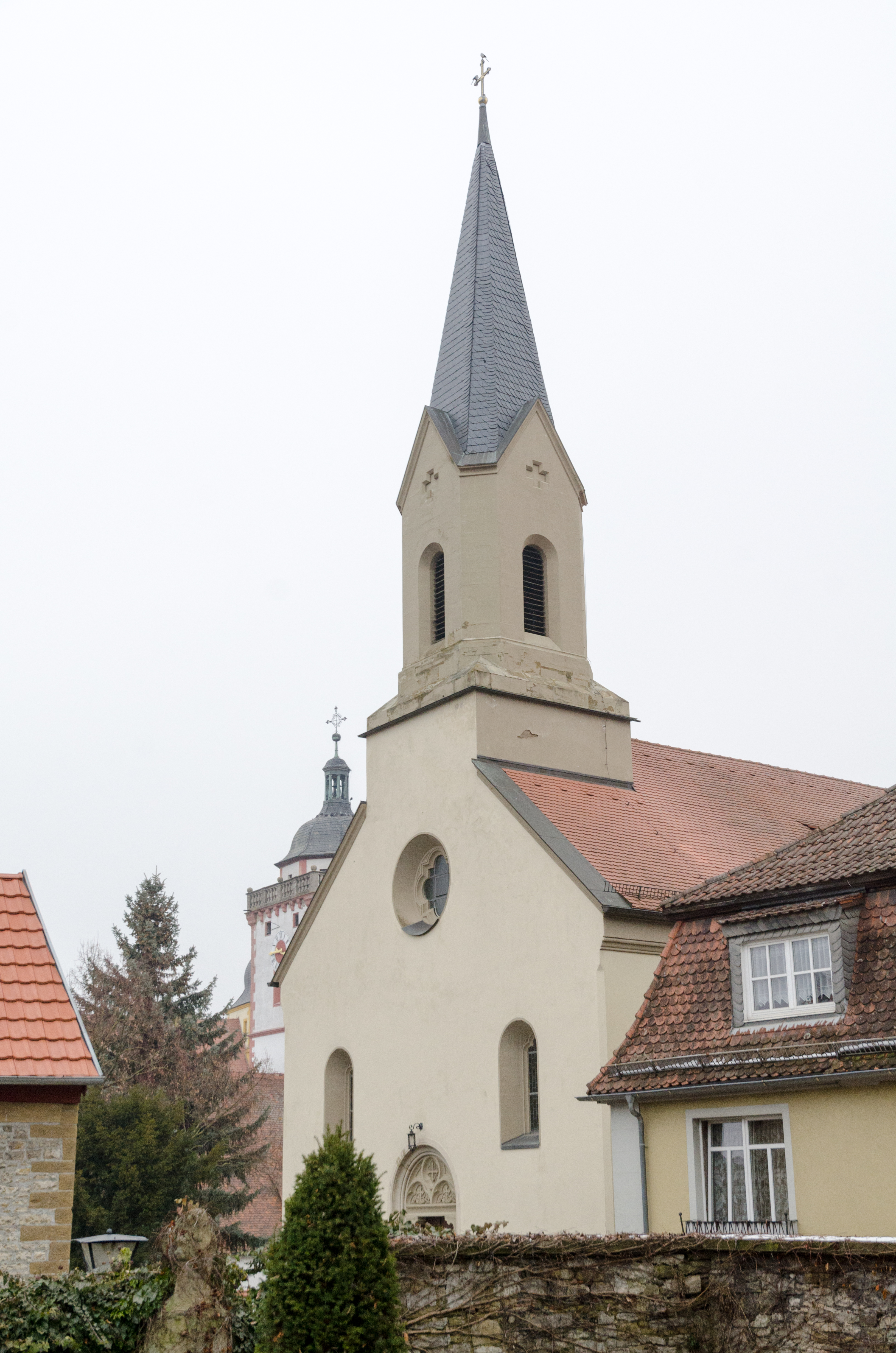 Marktbreit, Bahnhofstraße 5a